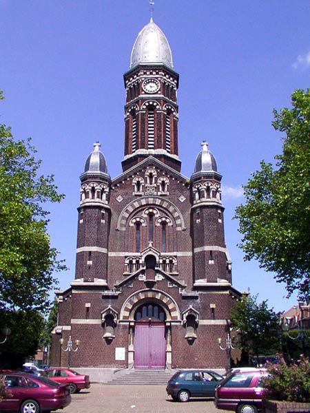 Eglise Sainte-Anne du Brun-Pain à Tourcoing